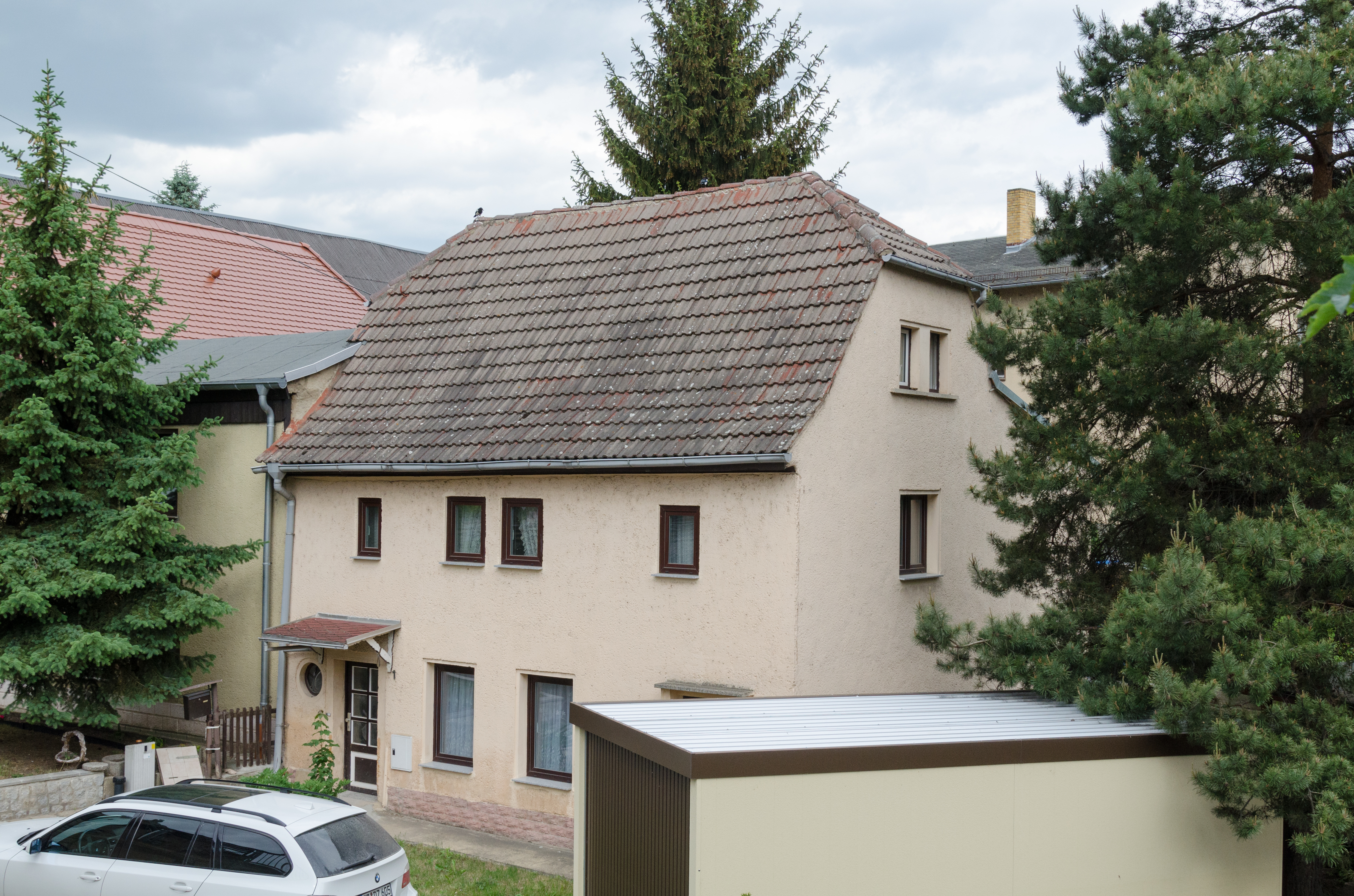 Zeitz, Badstubenvorstadt 1